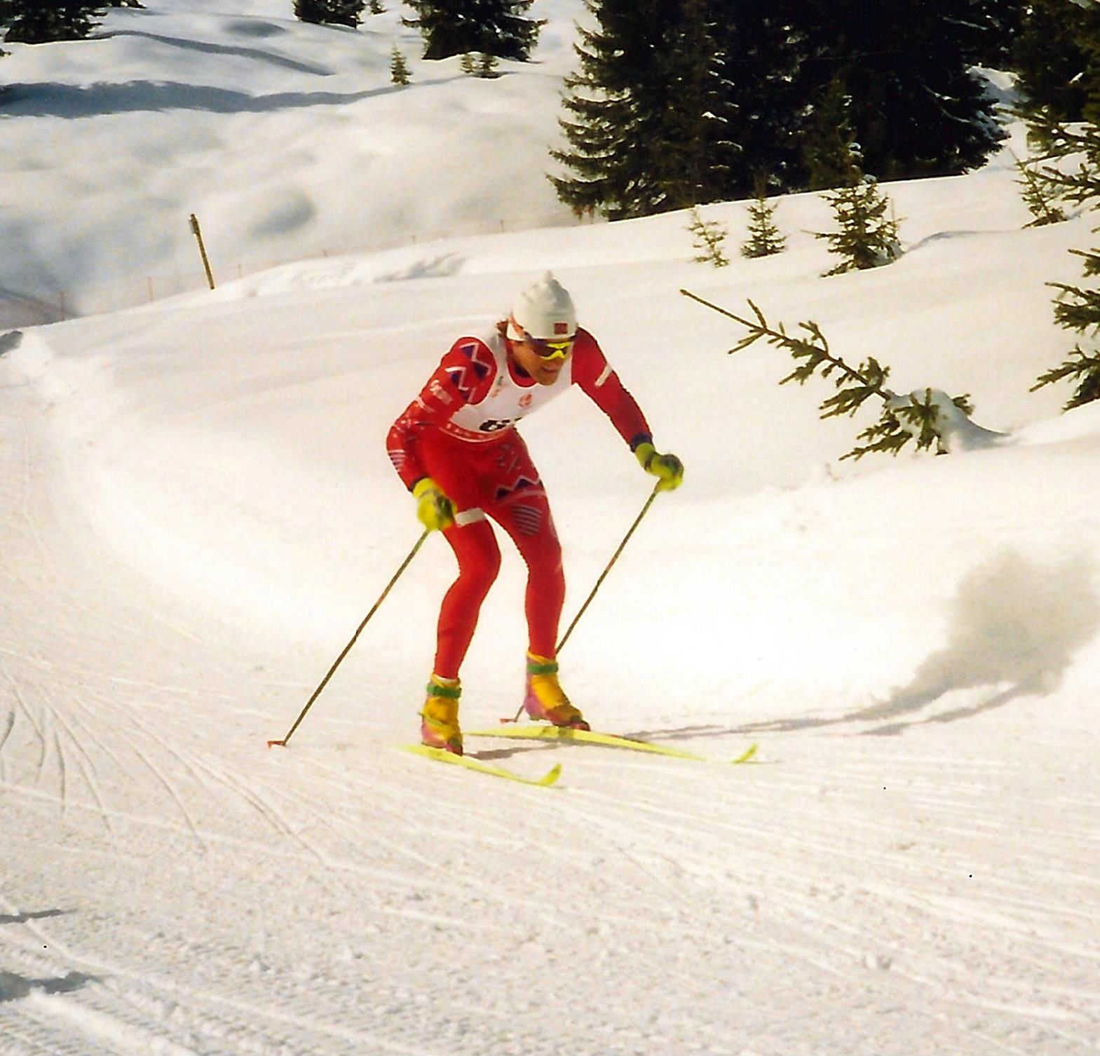 Vegard Ulvang lors du 50 km hommes des J.O. d'Alberville, le 22 février 1992.